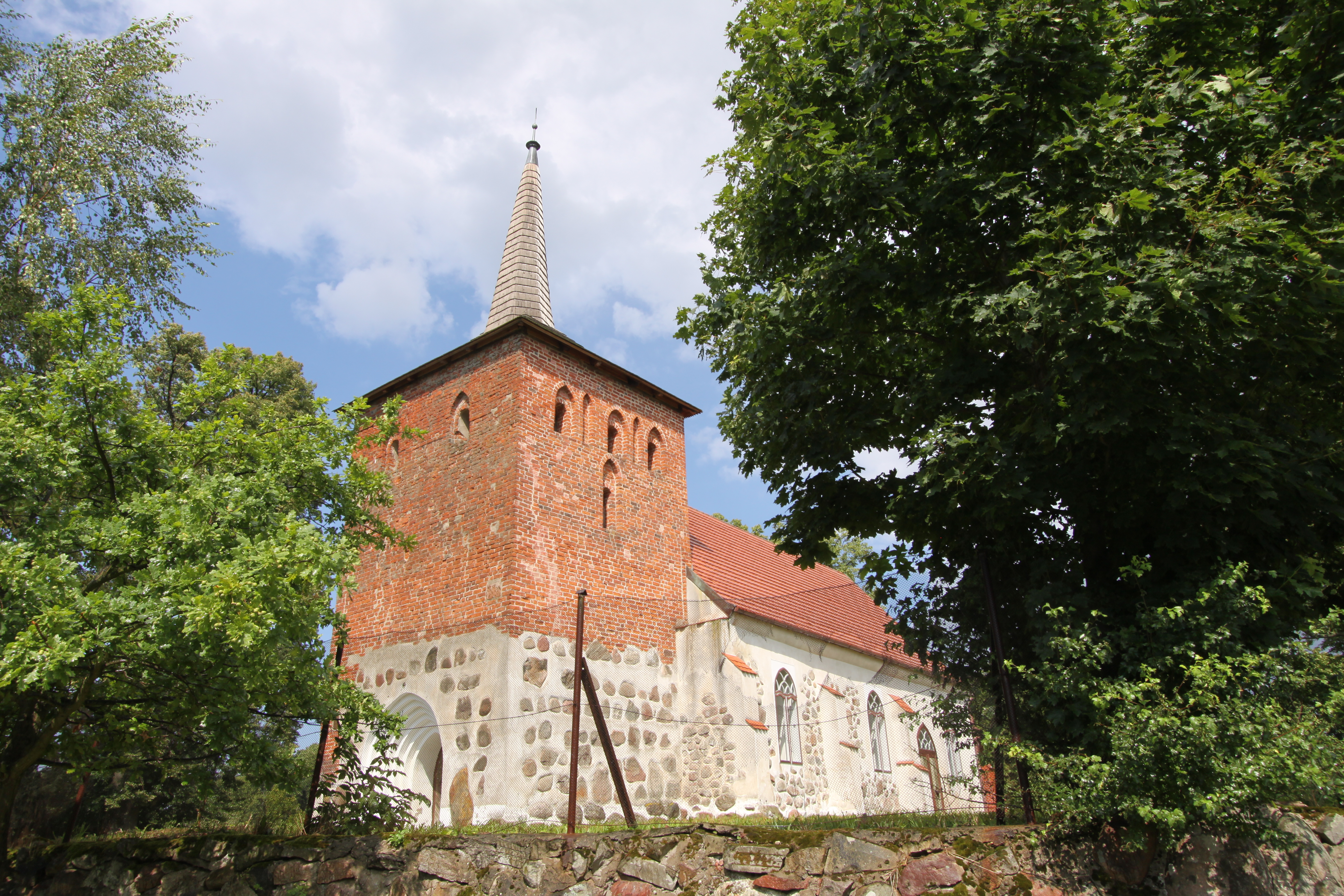 Rusowo, kościół fil. p.w. Matki Boskiej Różańcowej, XVI, 1684, XIX/XX